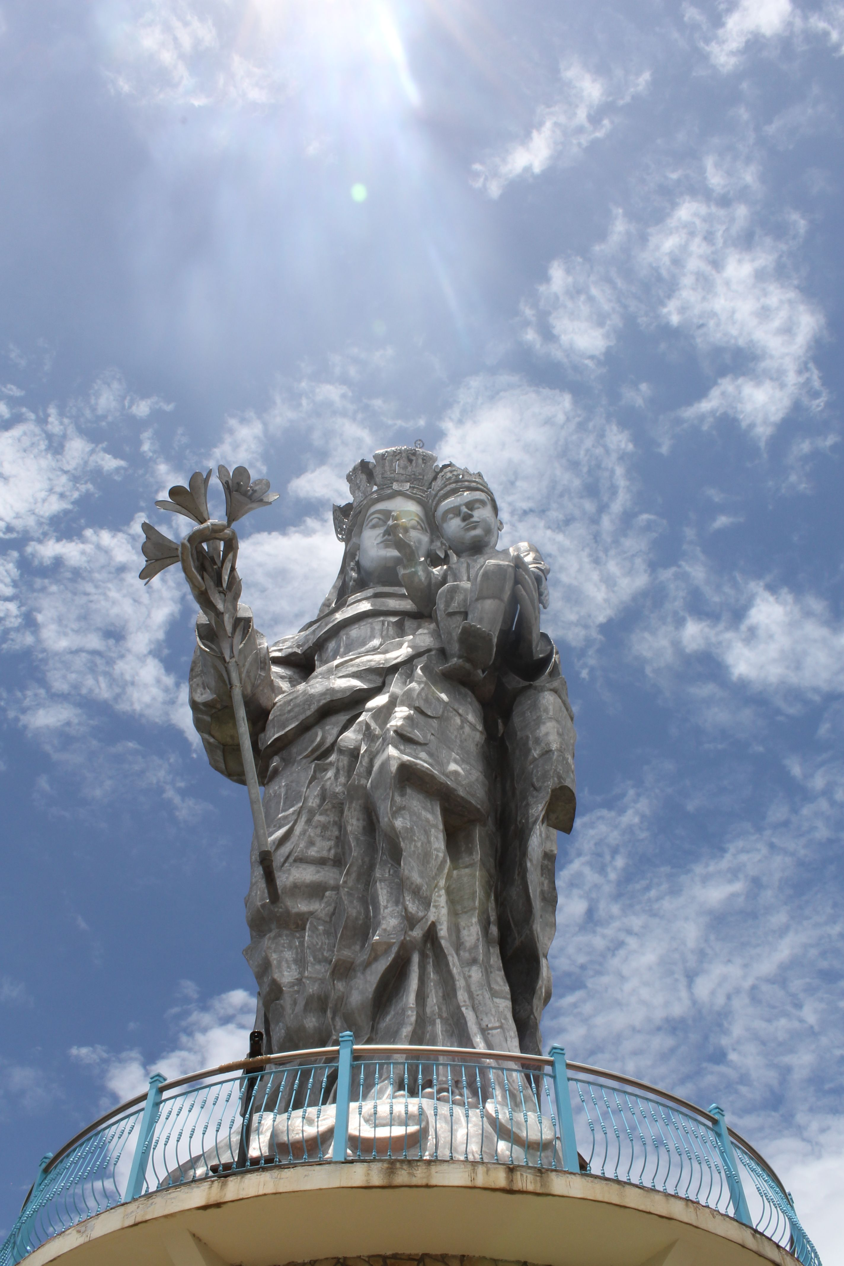 Representación de la Virgen de la Nube en el Cerro Abuga